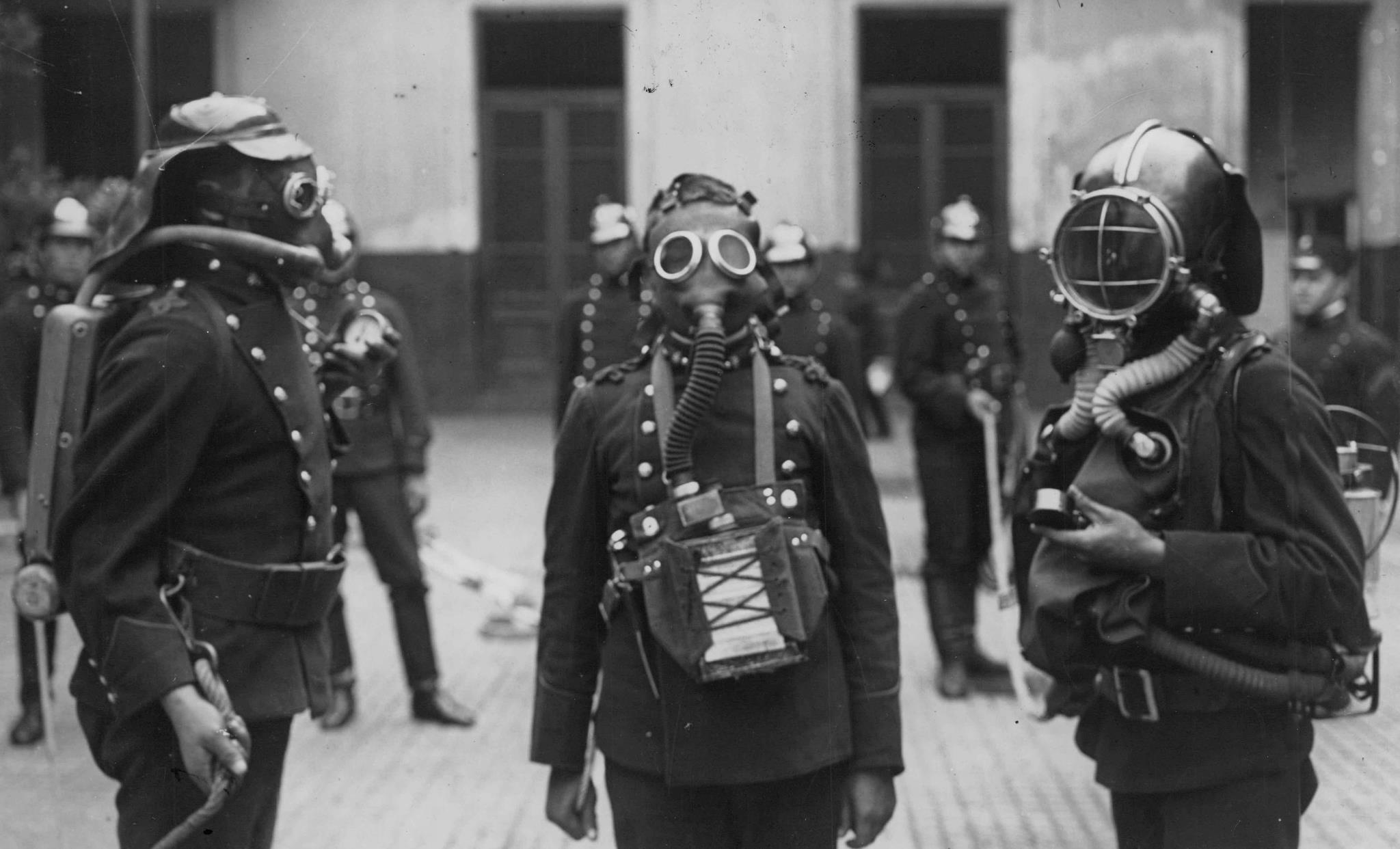 Buenos Aires, bomberos con cascos respiratorios, 1925. Inventario AGN 18651